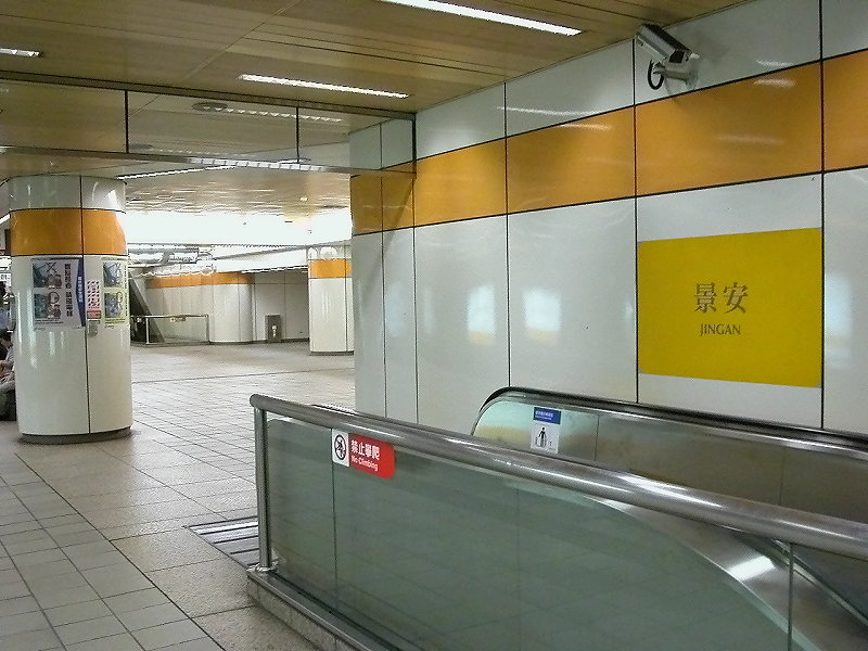 台北捷運景安站月台層。